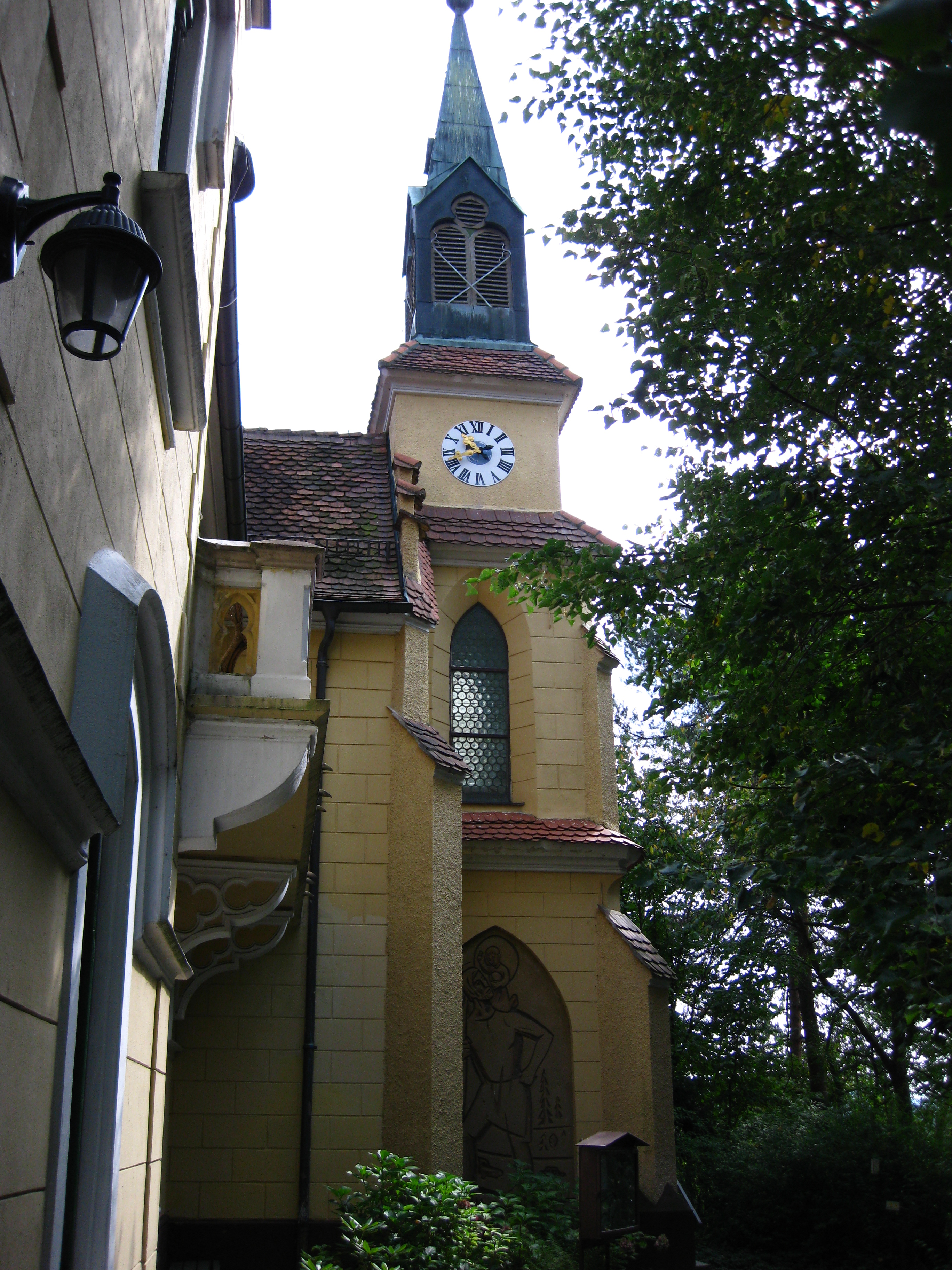 Graz VIII Kath Filialkirche Schmerzhafte Muttergottes